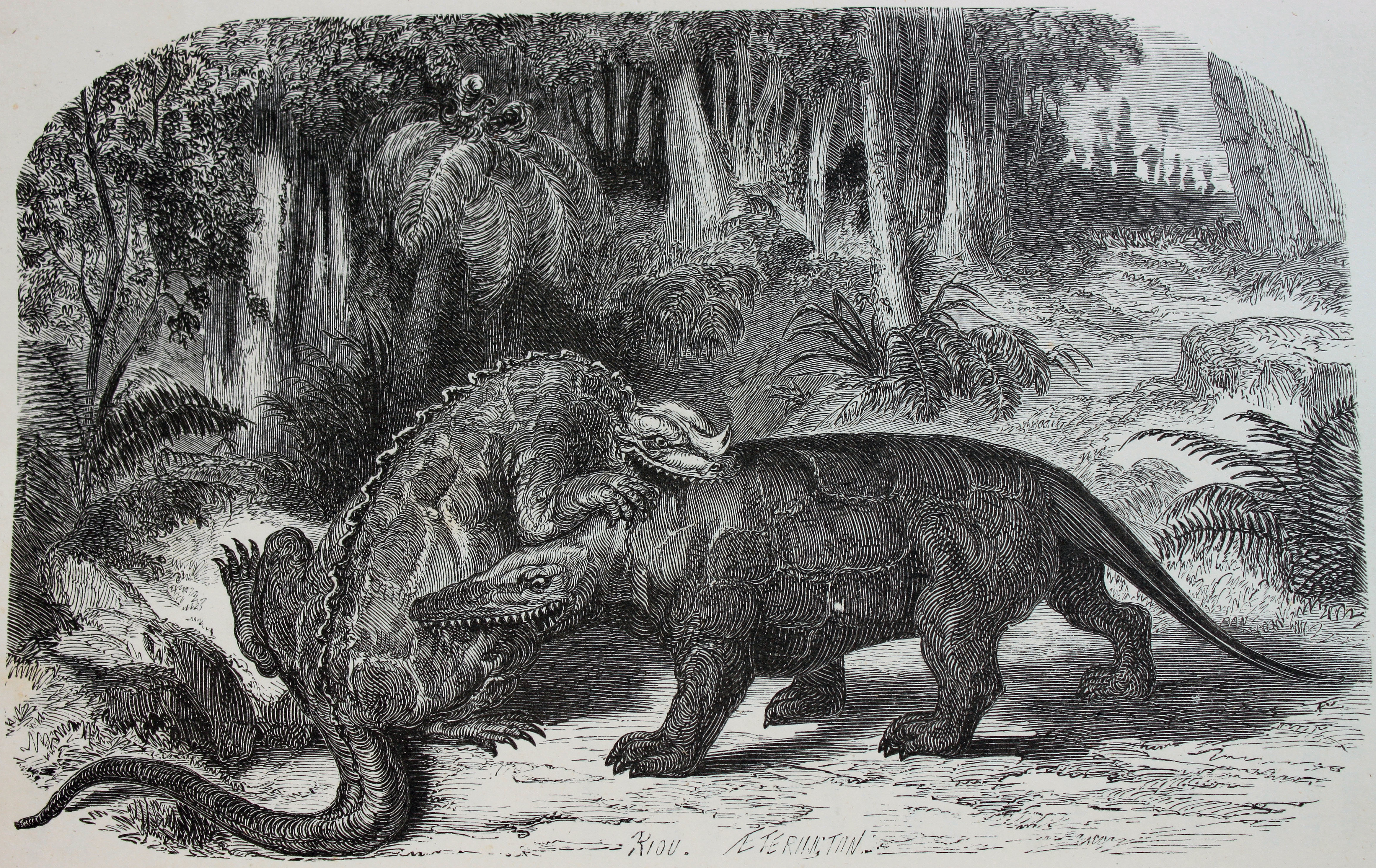 Classic depiction of Iguanodon battling Megalosaurus, in the style of the Crystal Palace dinosaurs. From La Terre avant le déluge / par Louis Figuier ; ouvrage contenant 25 vues idéales de paysages de l'Ancien Monde, dessinées par Riou